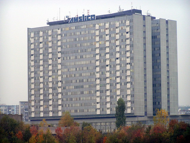 Lôžková časť Fakultnej nemocnice L. Pasteura v Košiciach